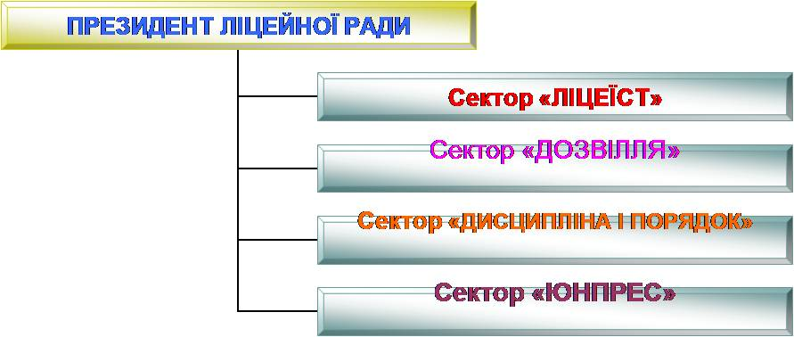 Учнівське самоврядування